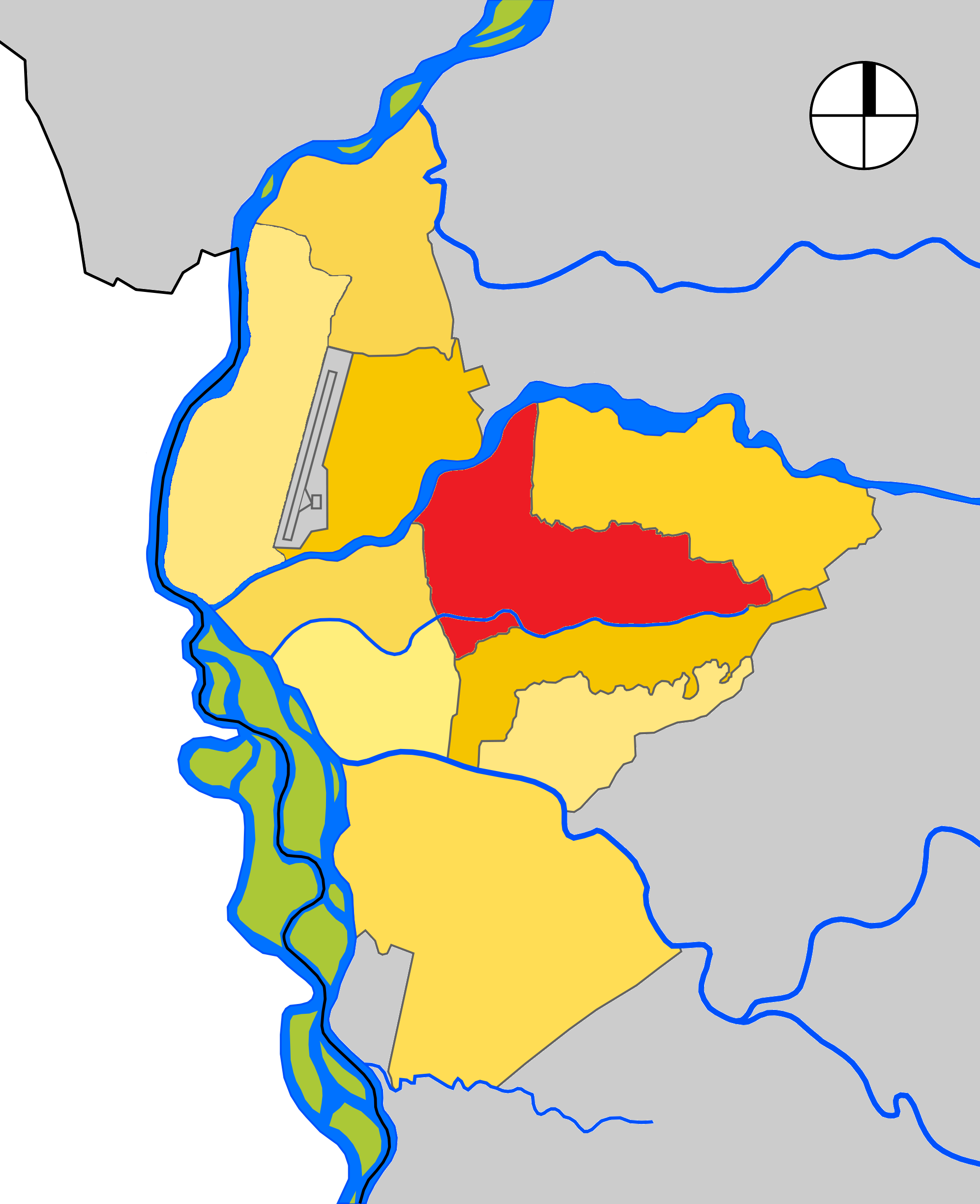 Mapa de las Comuna 5 de Neiva, departamento del Huila, Colombia.